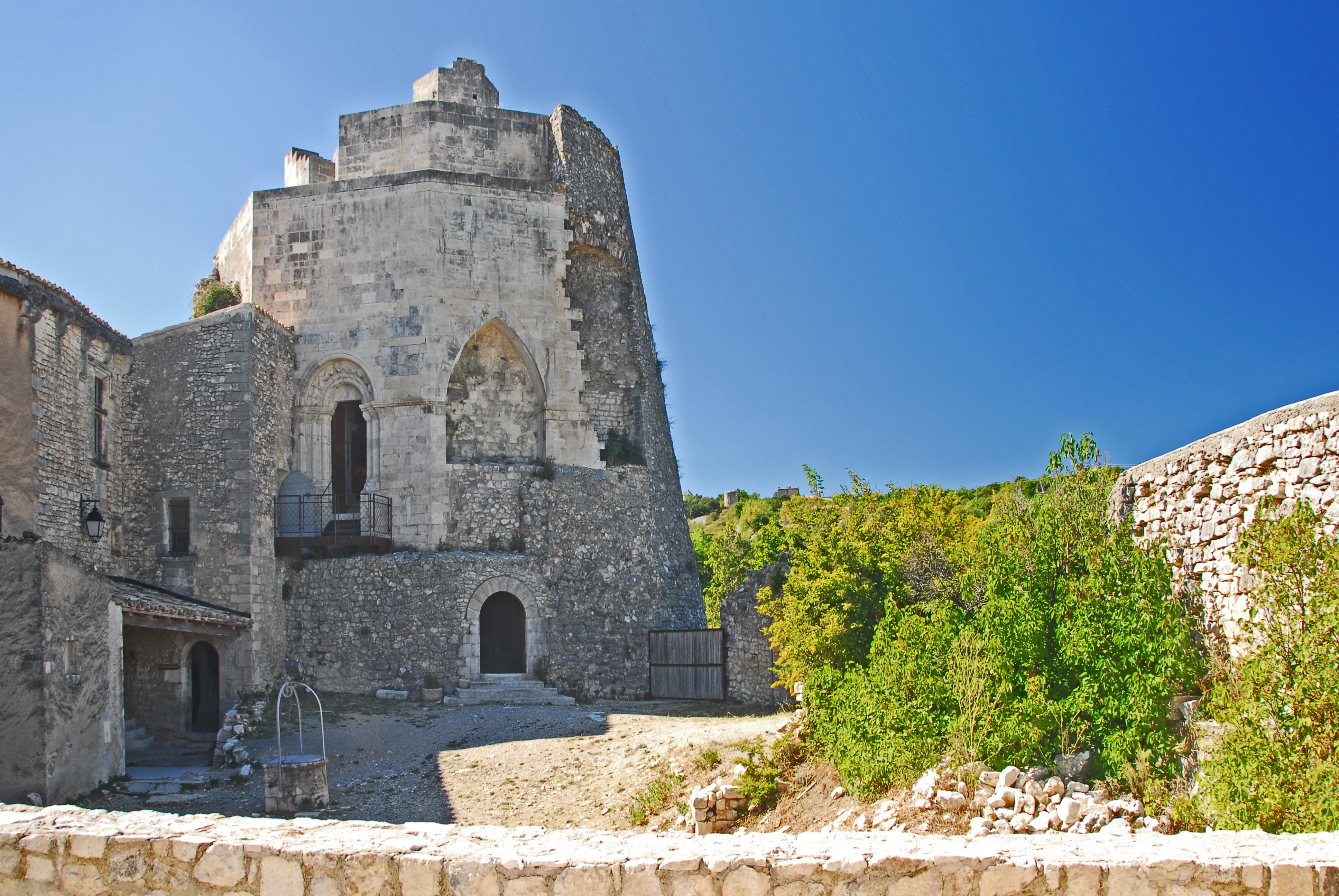 Chateau de Simiane-la-Rotonde, Burghof u. Donjon von SO